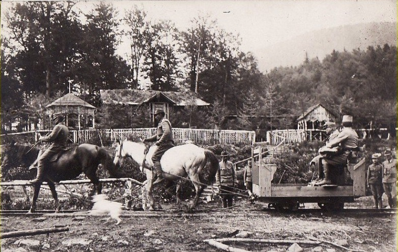 Calea ferată îngustă de pe valea Cașinului, 1917.